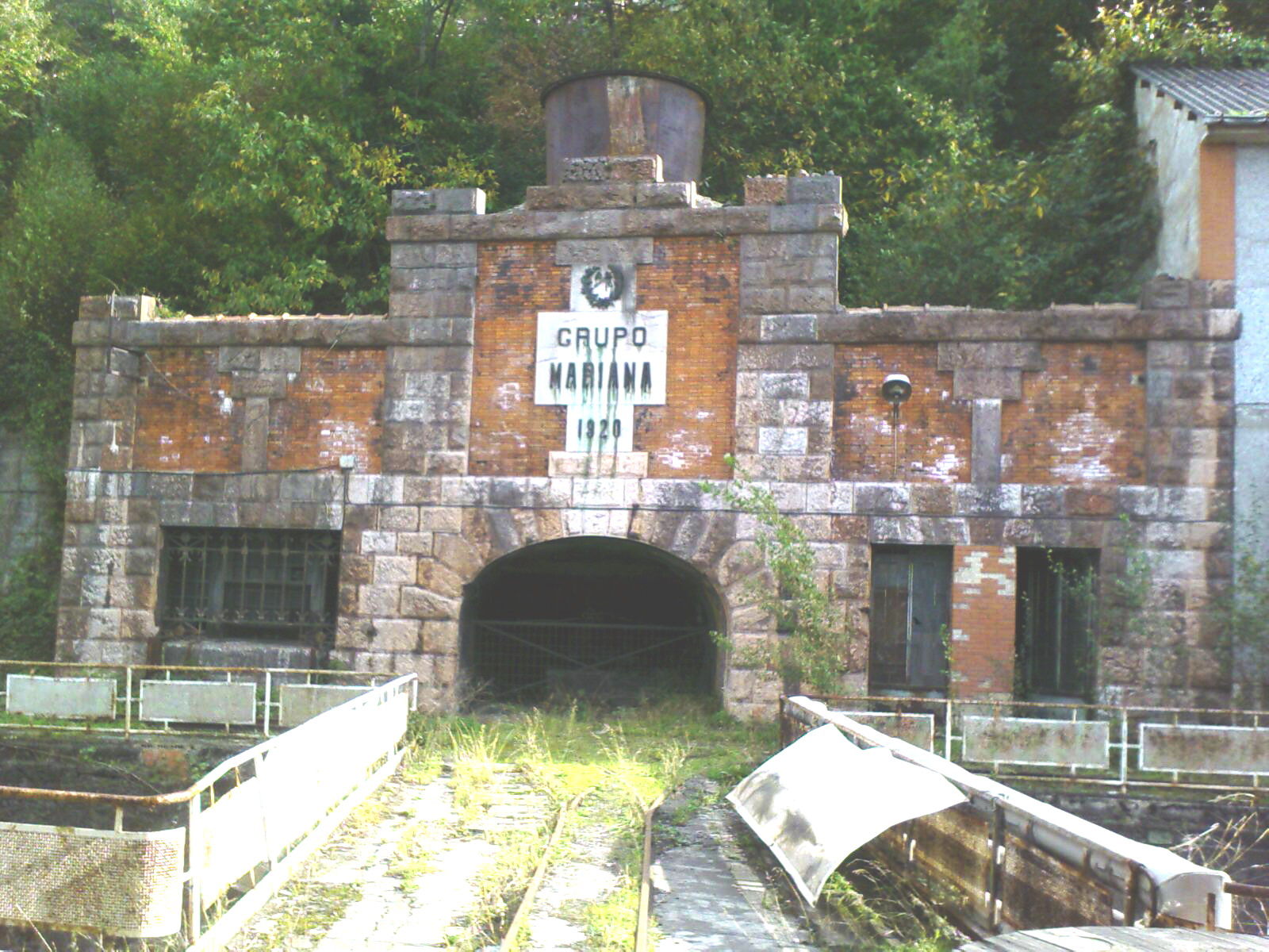 Bocamina del socavón Barredo de Mina Mariana (1920), Mieres, Asturias, España